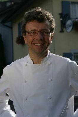 Gérard Rabaey, chef du restaurant le Pont de Brent